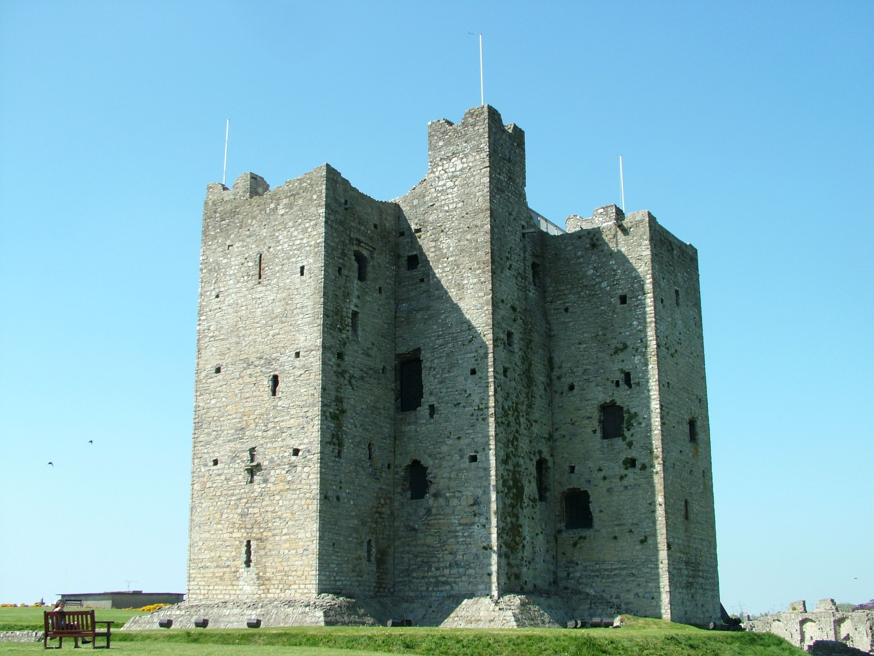 Trim, die Burg (castle), in Irland, Gesamtansicht